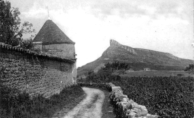 Fief de la Grange-Murger à Solutré (71). Le fief des Murgers a appartenu jusqu'à la fin du XVIIIe siècle à la Famille Tupinier (dont Maître Emilian Tupinier, Conseiller du Roi en l'élection de Mâcon) puis jusqu'au début du XXe siècle à la Famille Lassarat (de) (dont Maître Pierre de La Sarra, Notaire et Procureur Royal en Beaujolais).